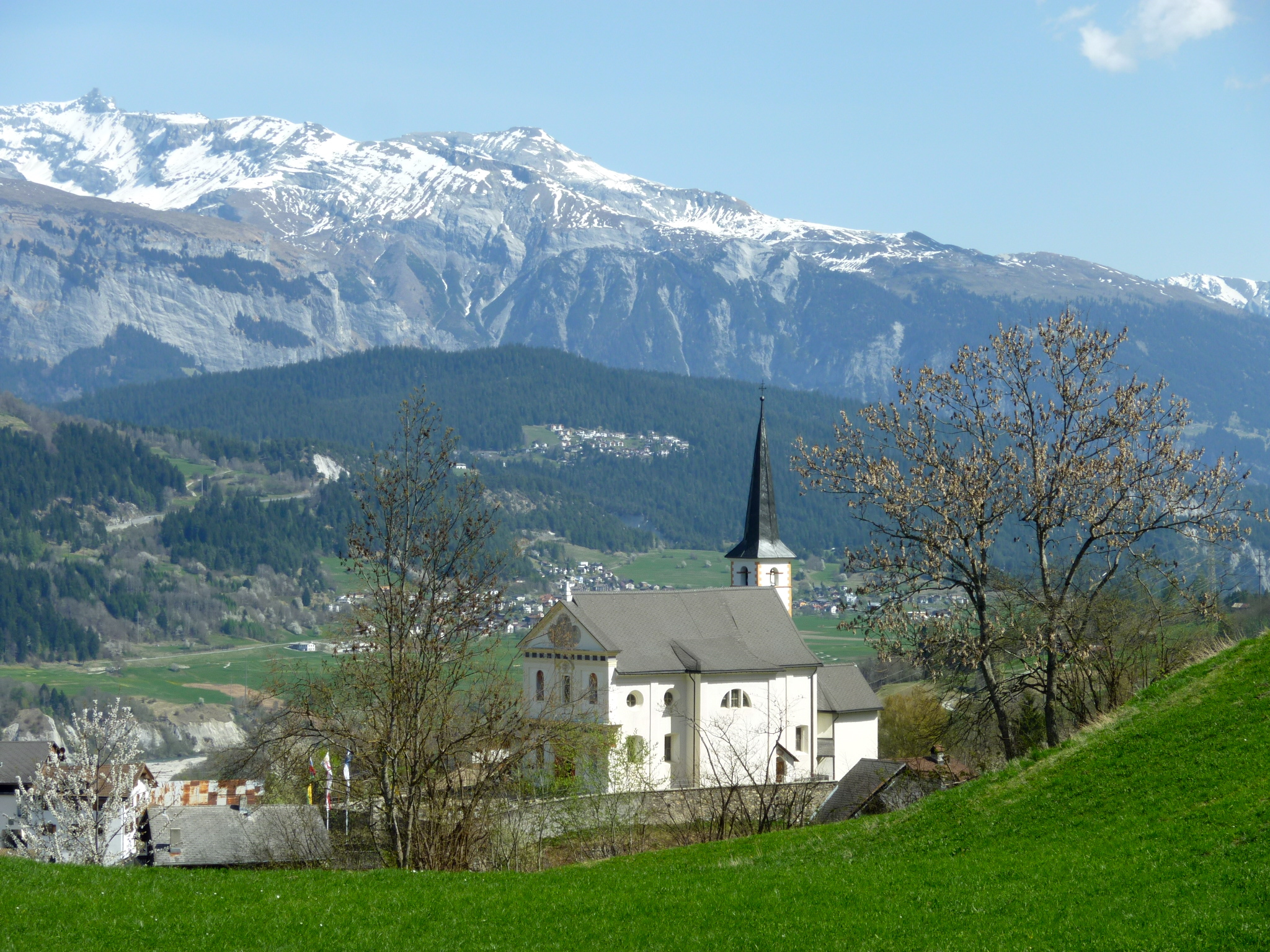 Sevgein Kirche